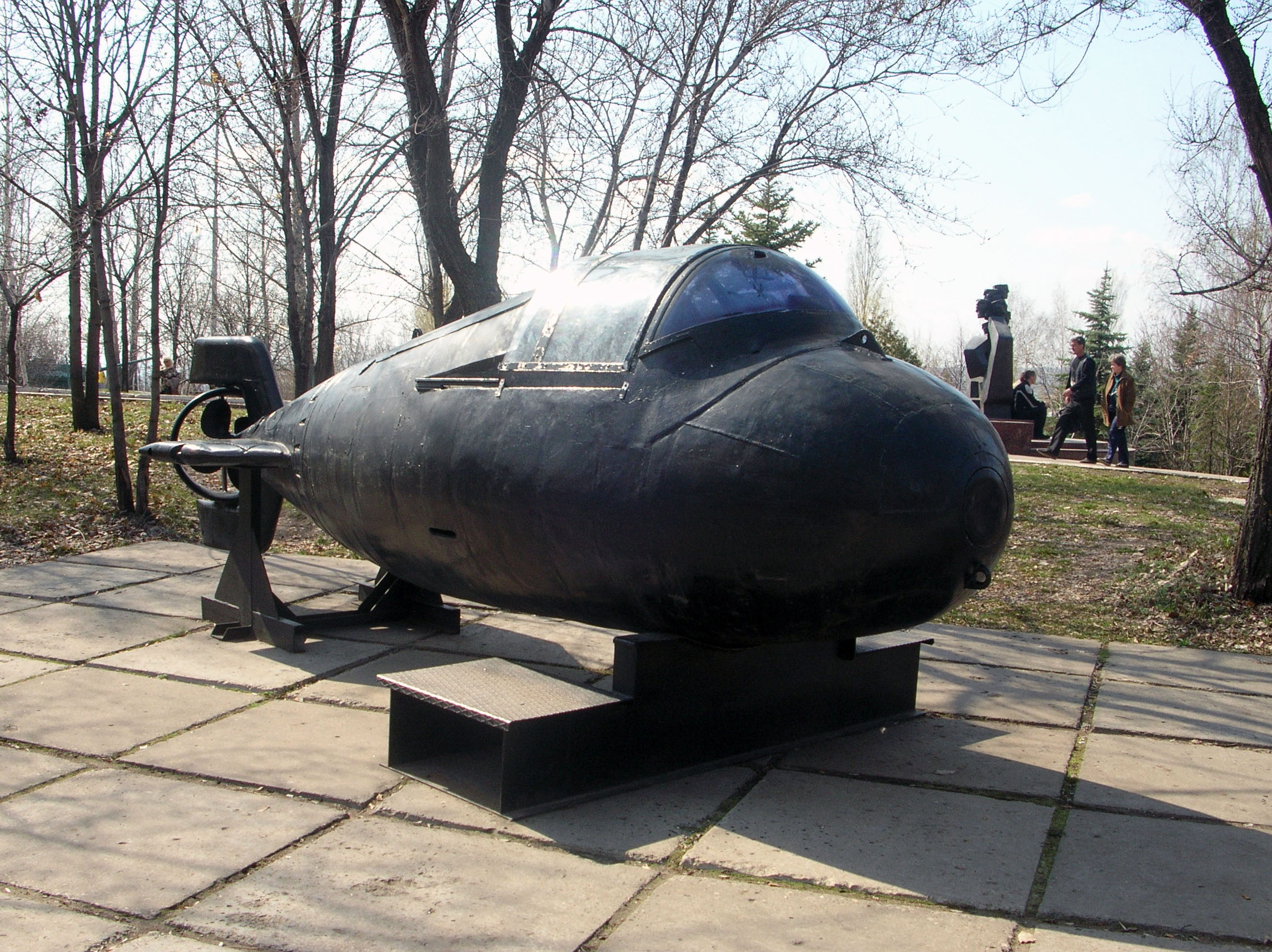 Сверхмалая подводная лодка "Тритон-1М". Парк Победы, г. Саратов.